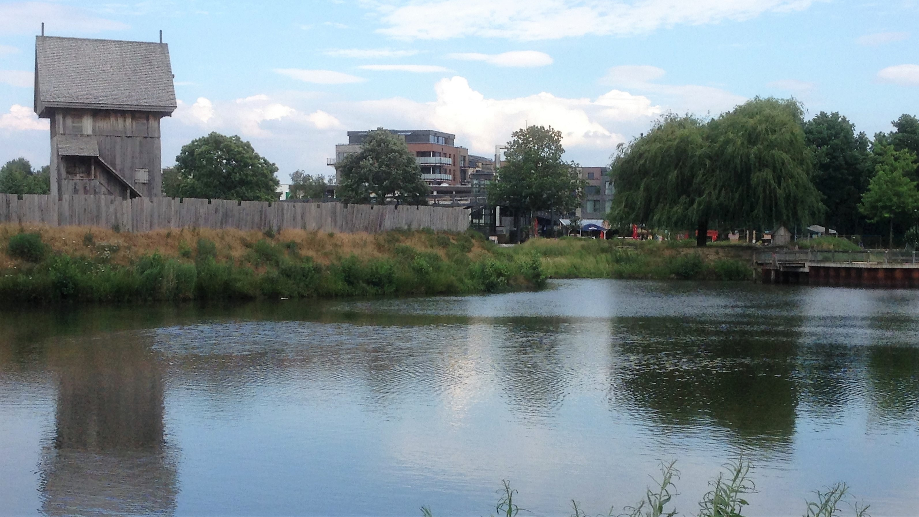 Im Vorder- und Mittelgrund der Park der Zitadelle Vechta. Links das Castrum Vechtense. Hinter der Bahnlinie Delmenhorst-Hesepe im Hintergrund das neue Bahnhofsviertel Vechtas.